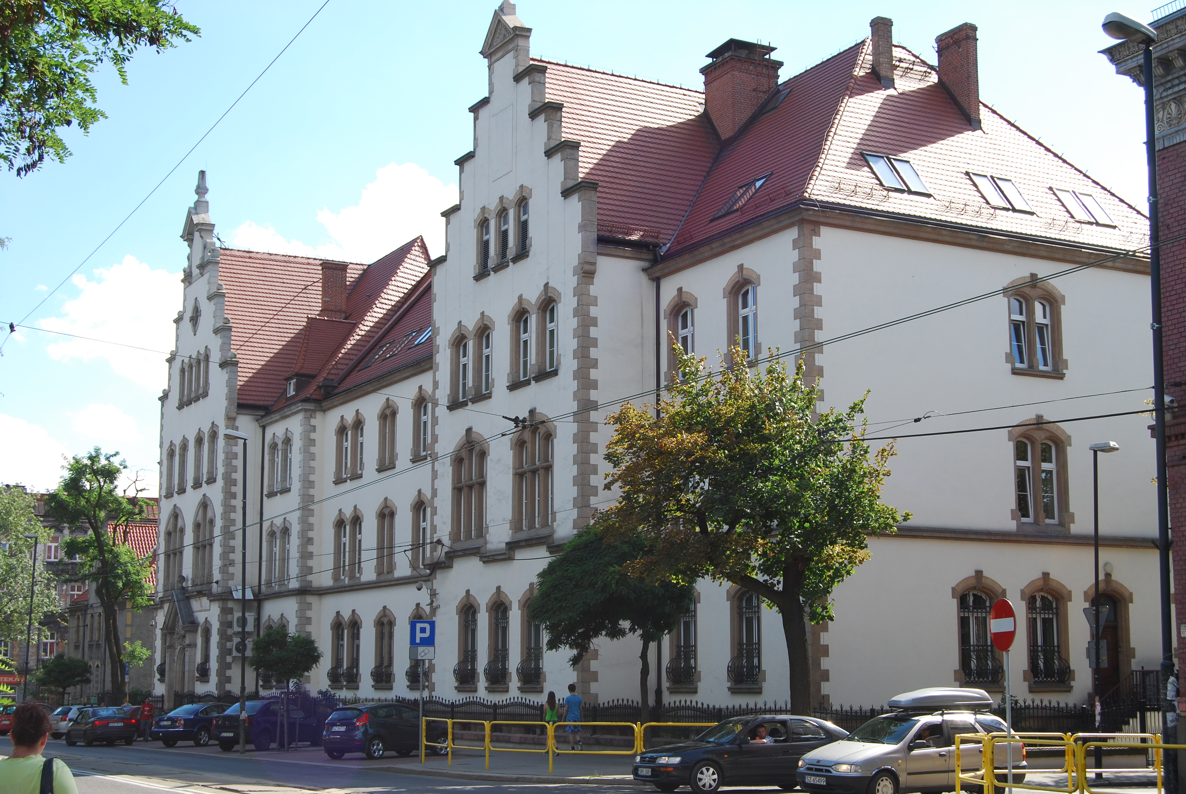 Zabrze, ul. 3 Maja 21 - budynek Sądu Rejonowego (zabytek nr A/354/11 z 14.11.2011)